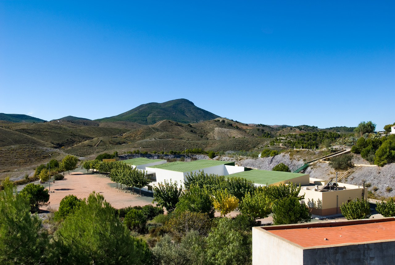 Albergue Juvenil y cumbre del Cabezo de la Jara al fondo